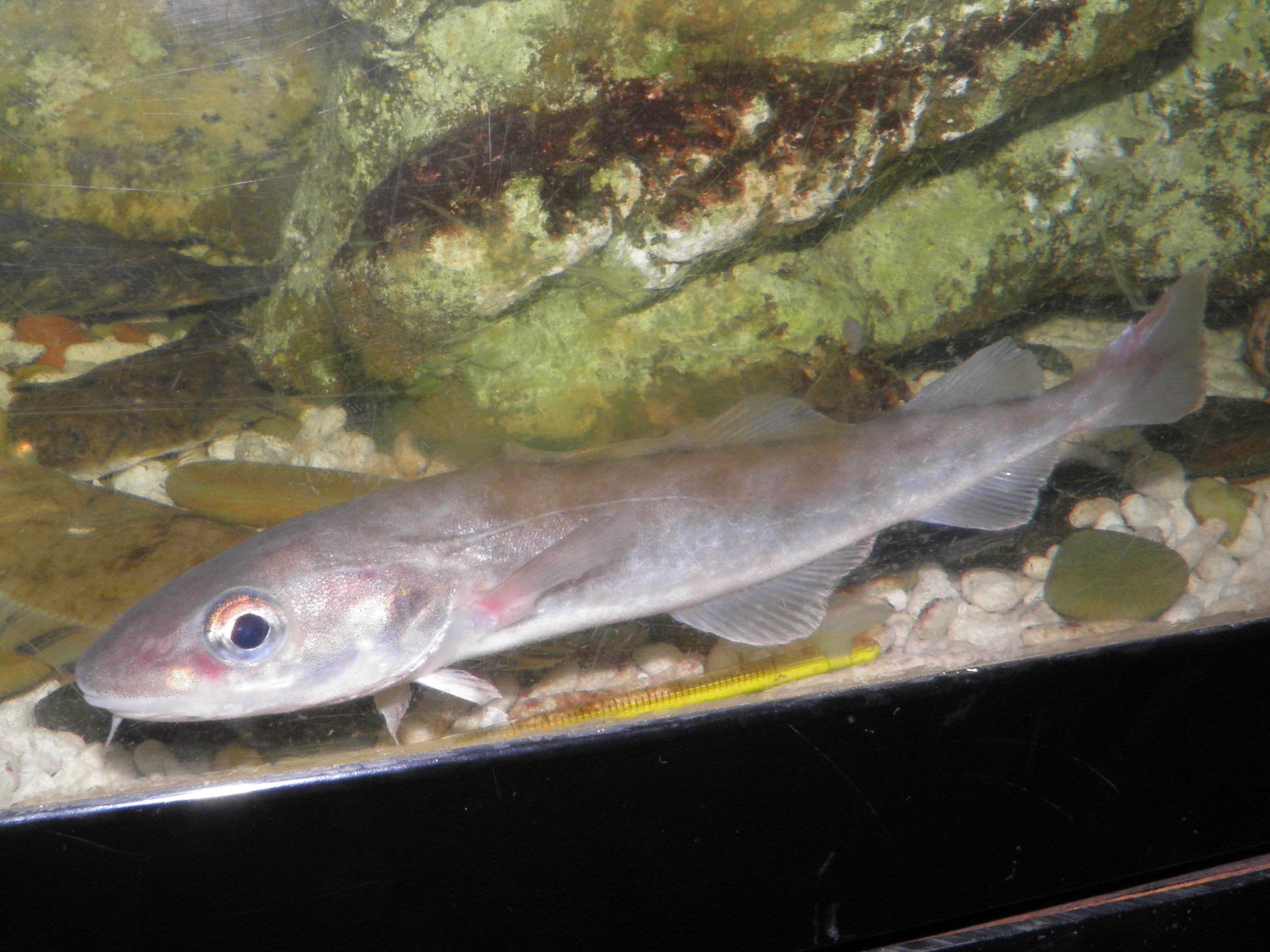 Дальневосточная навага (Eleginus gracilis) в океанариуме Владивостока